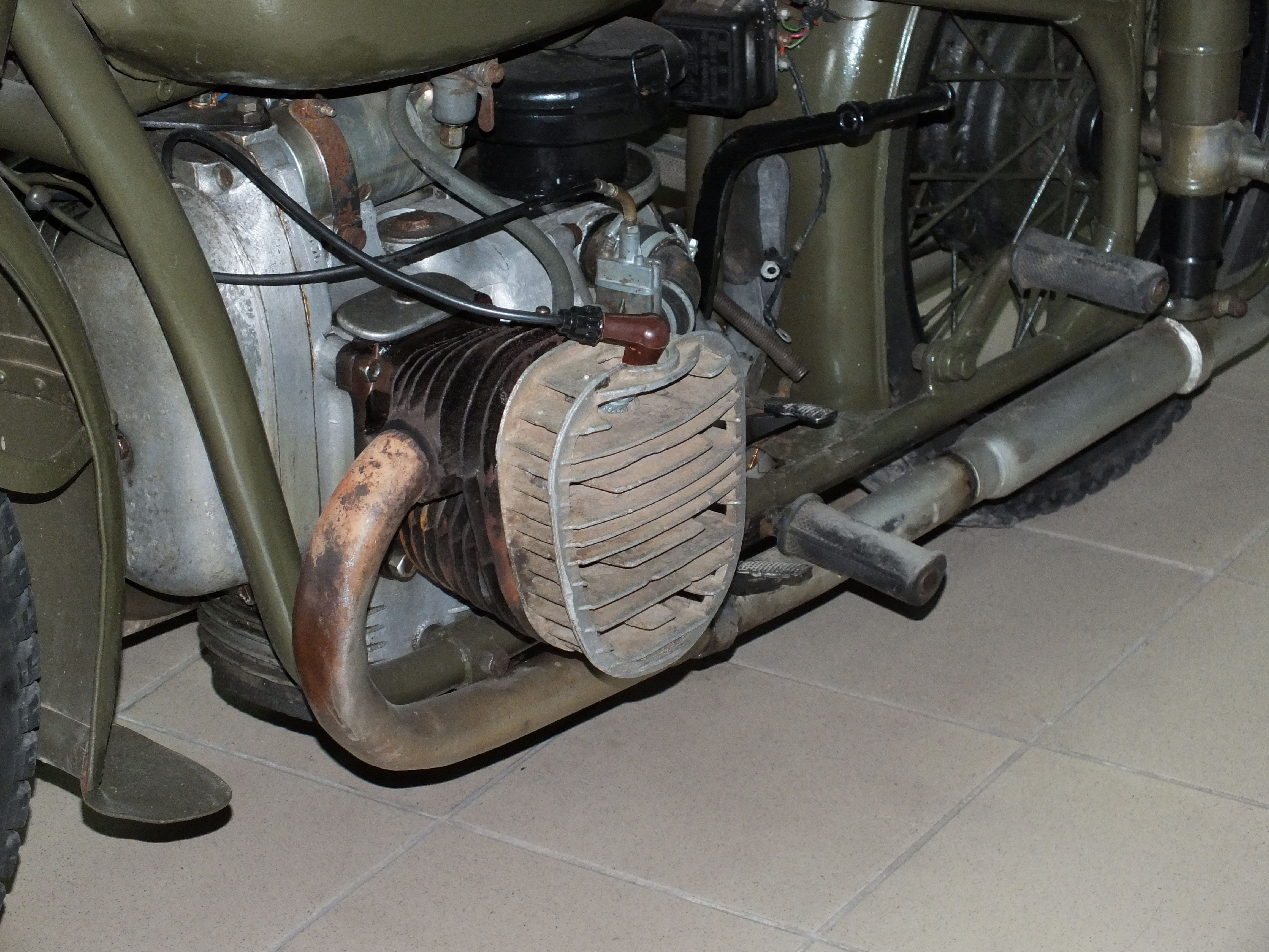 Мотоцикл M-72